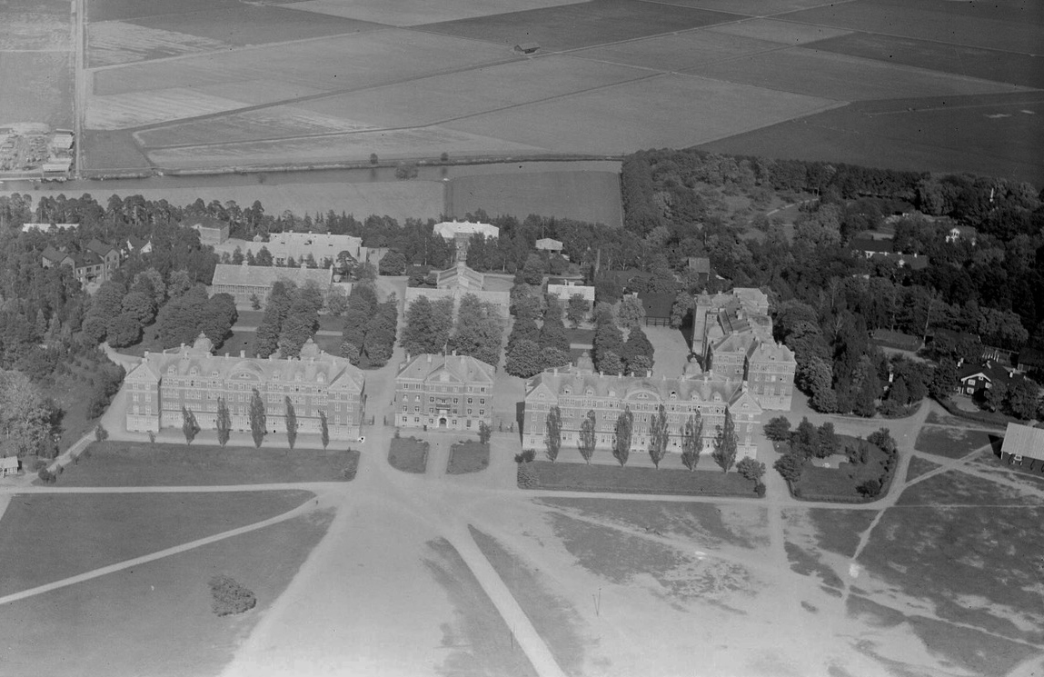 Flygfoto över Upplands Regemente (I 8), Kronåsen, Polacksbacken, Uppsala.